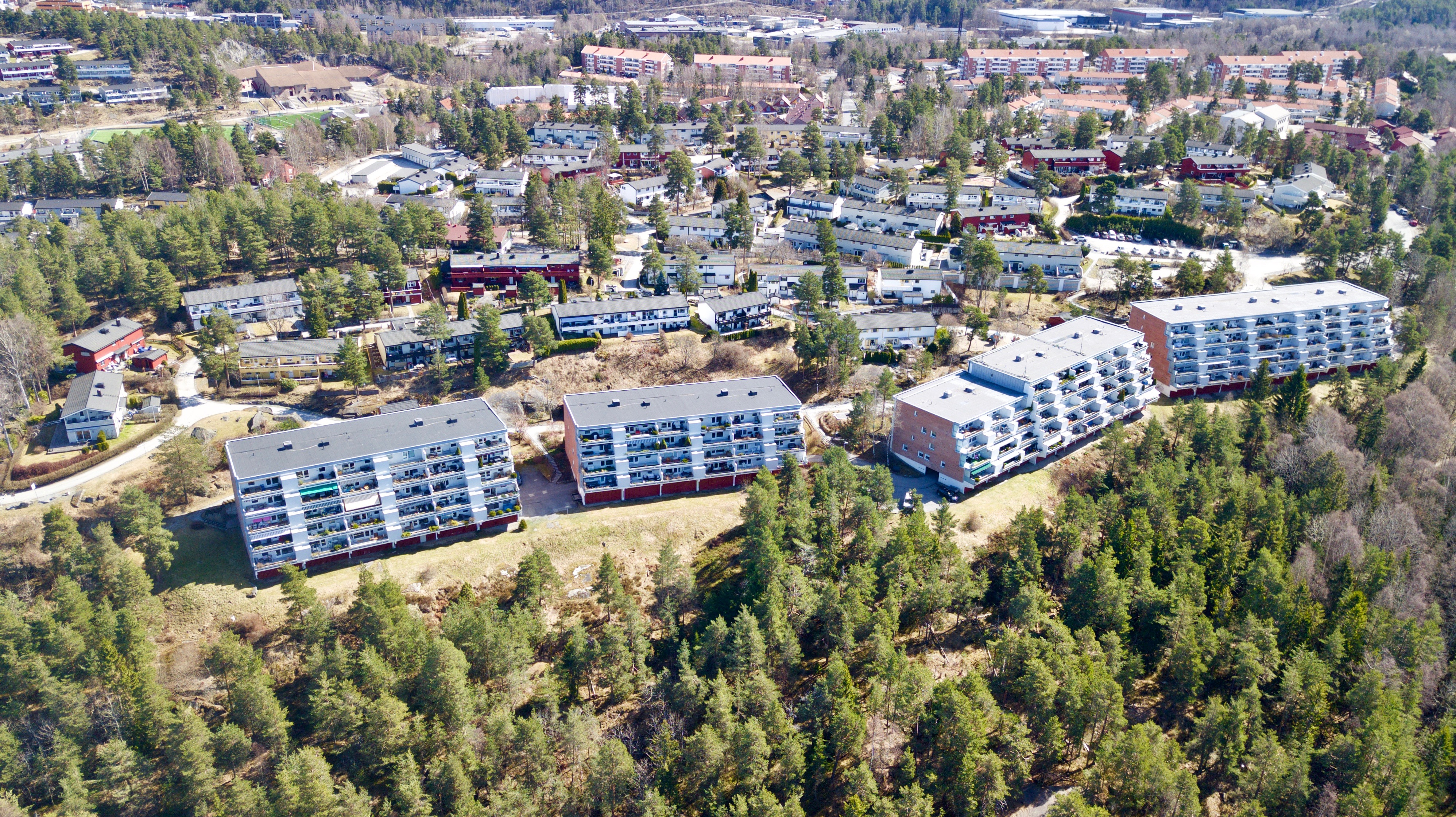 Nordåssløyfa. Holmlia i Oslo